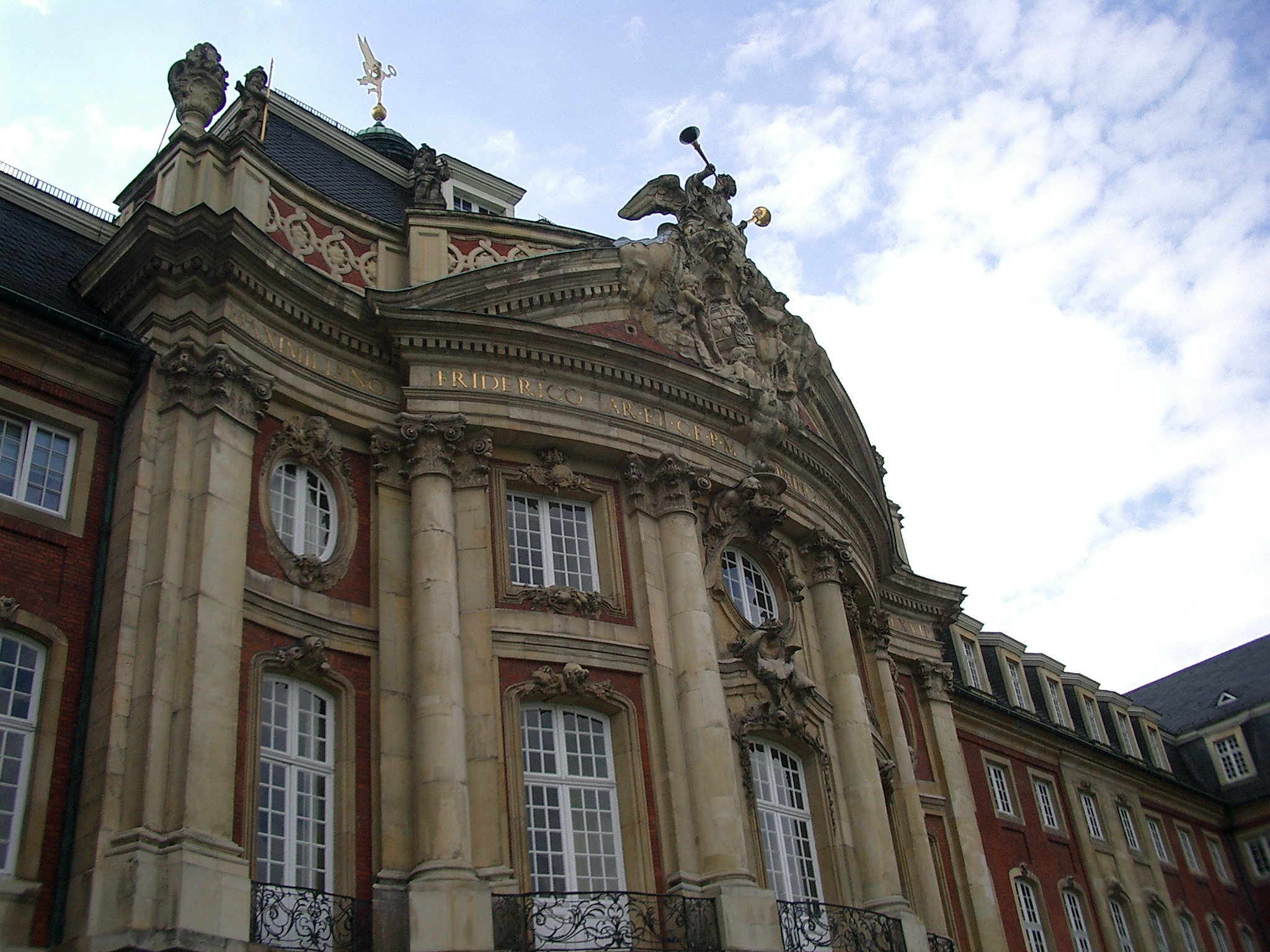 Architektur und Skulpturen über dem Haupteingang des fürstbischöflichen Residenzschlosses in Münster, Westfalen, Deutschland